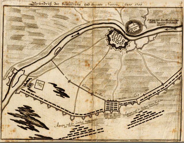 Scan from Johann Christoph Brotze's book Sammlung verschiedner Liefländischer Monumente. Grundriß der Belagerung und Succurs Narva, Anno 1700 [der Plan; die Gravüre].